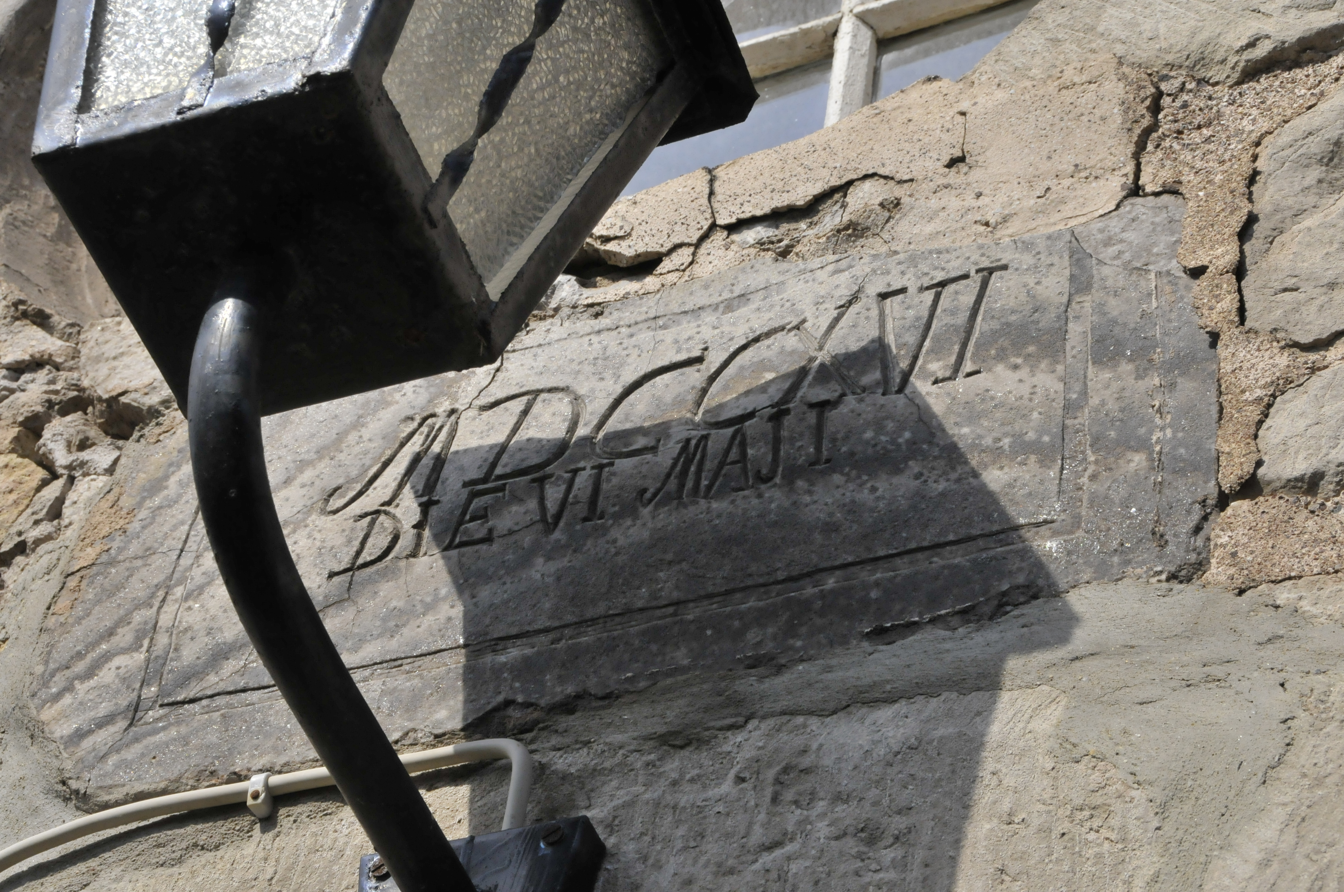 Pützlingen, Kirche, Jahreszahl über Eingangsportal